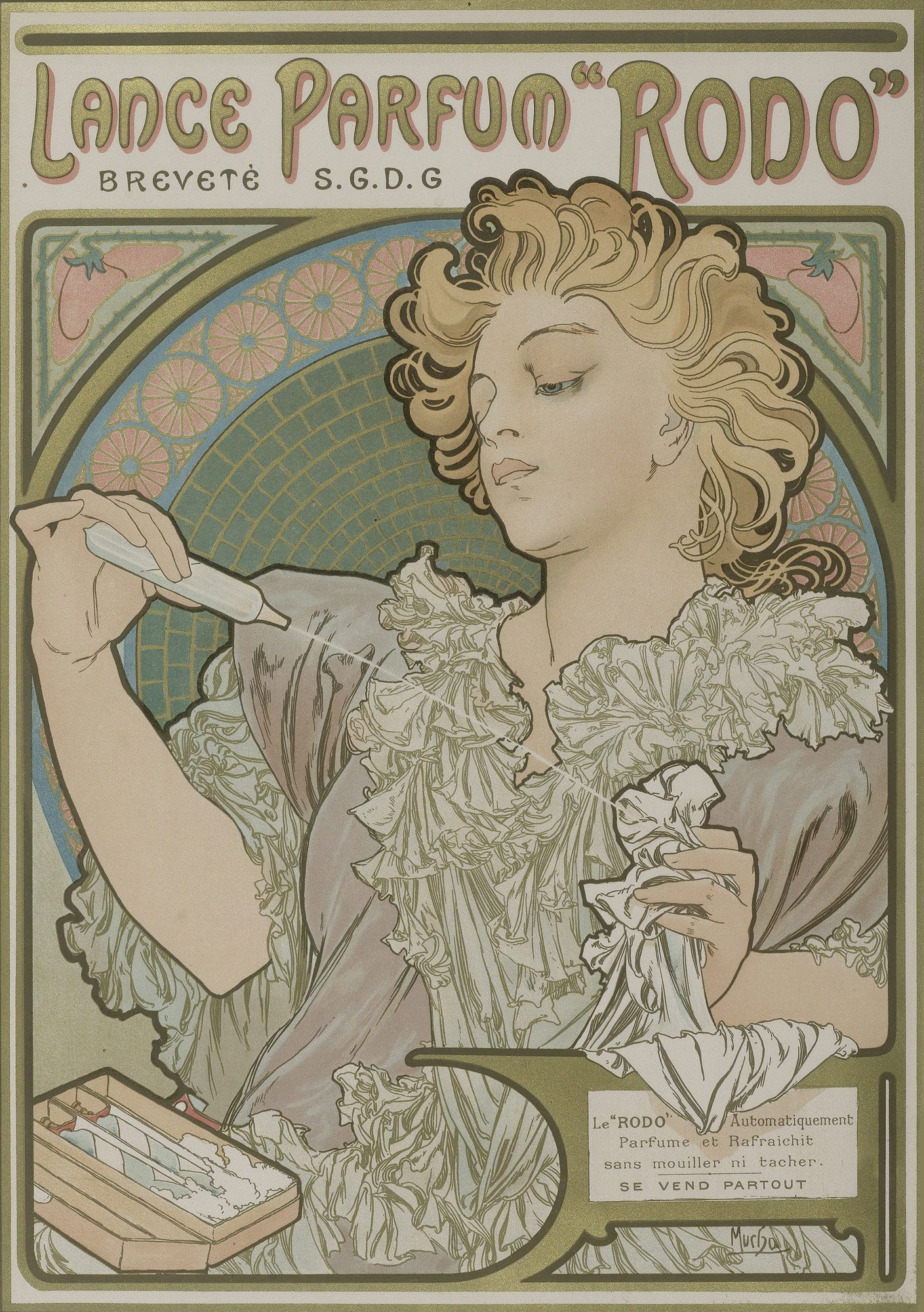 Lance Parfum Rodo 1896-97 Lithographie couleurs. Signé Mucha dans la pierre en bas à droite. 43x30 cm.